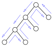 po